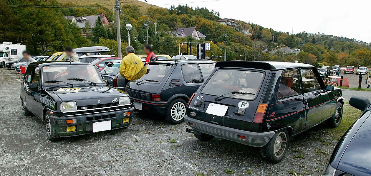 Two Renault 5 Alpine Turbos